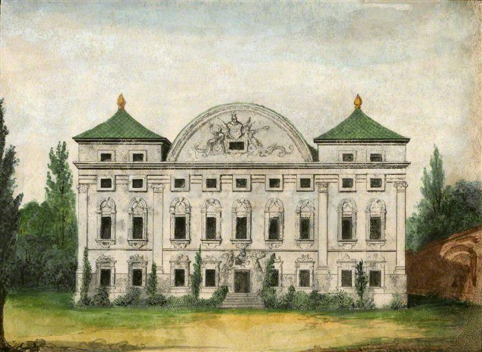 Беларуская (тарашкевіца): Вільня (Vilnia), Антокаль (Antokal), палац Сапегаў (Sapieha)